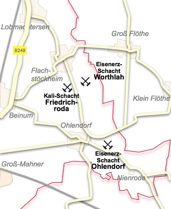 Karte der Schachtanlagen Friedrichroda (Kali), Worthlah und Ohlendorf (beide Eisenerz). Anmerkungen:Die Karte zeigt die Lage der Schachtanlagen des Kaliwerkes Friedrichroda und der Eisenerzgruben Worthlah und Ohlendorf in den Gemarkungen von Salzgitter-Flachstöckheim und Salzgitter-Ohlendorf. Um eine Orientierung zu erleichtern, wurde dem Plan eine aktuelle Straßenkarte unterlegt.